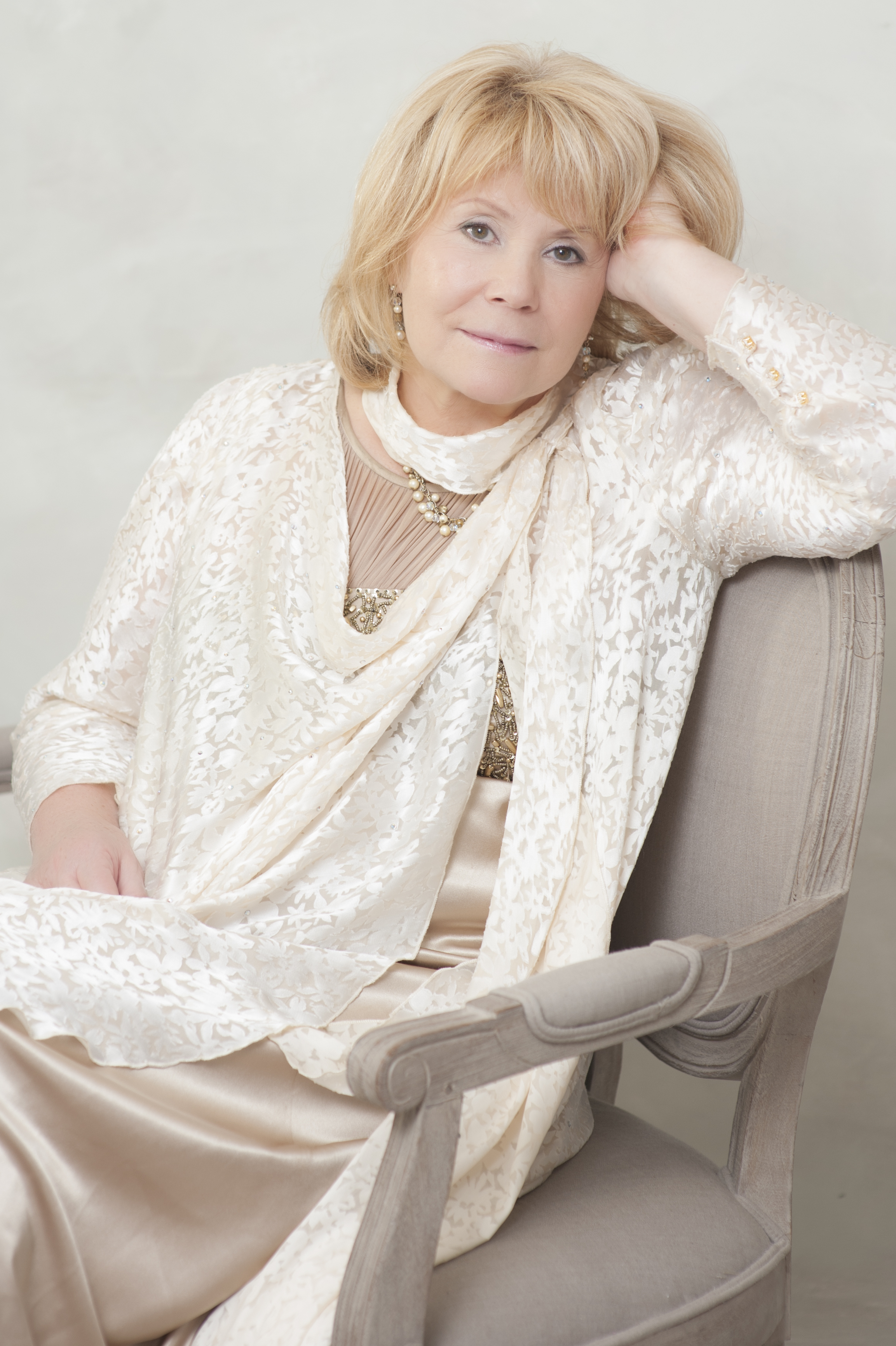 Галина Улётова